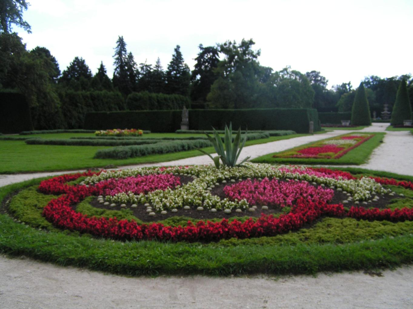 Zahrady zámku Lednice. Autor: Xkasm26